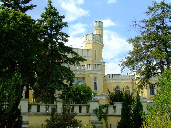 Sir David Kastélyszálló homlokzata, Balatonszepezd